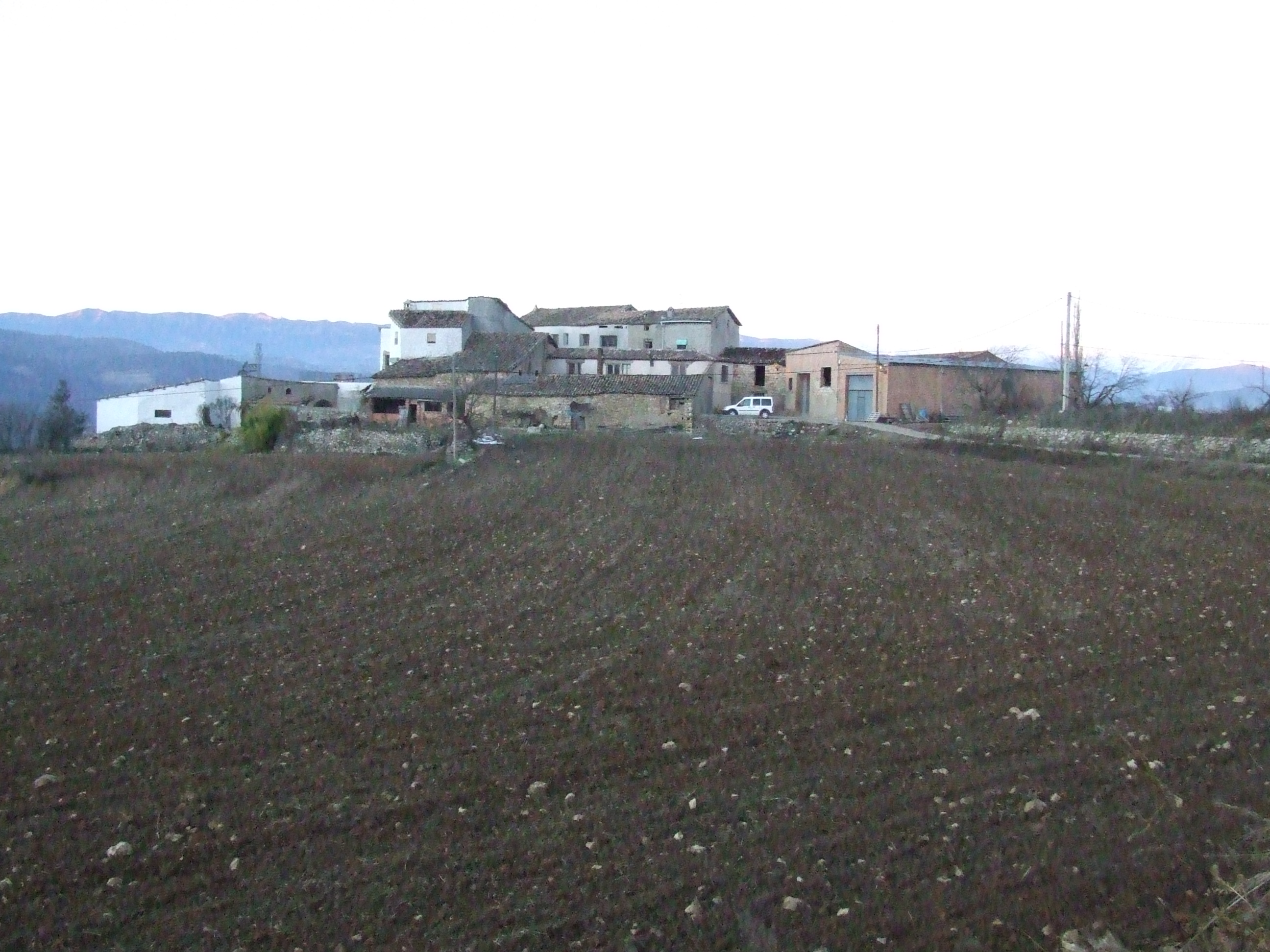 El Mas de Solduga, o els Masos de Llimiana (Llimiana, Pallars Jussà)